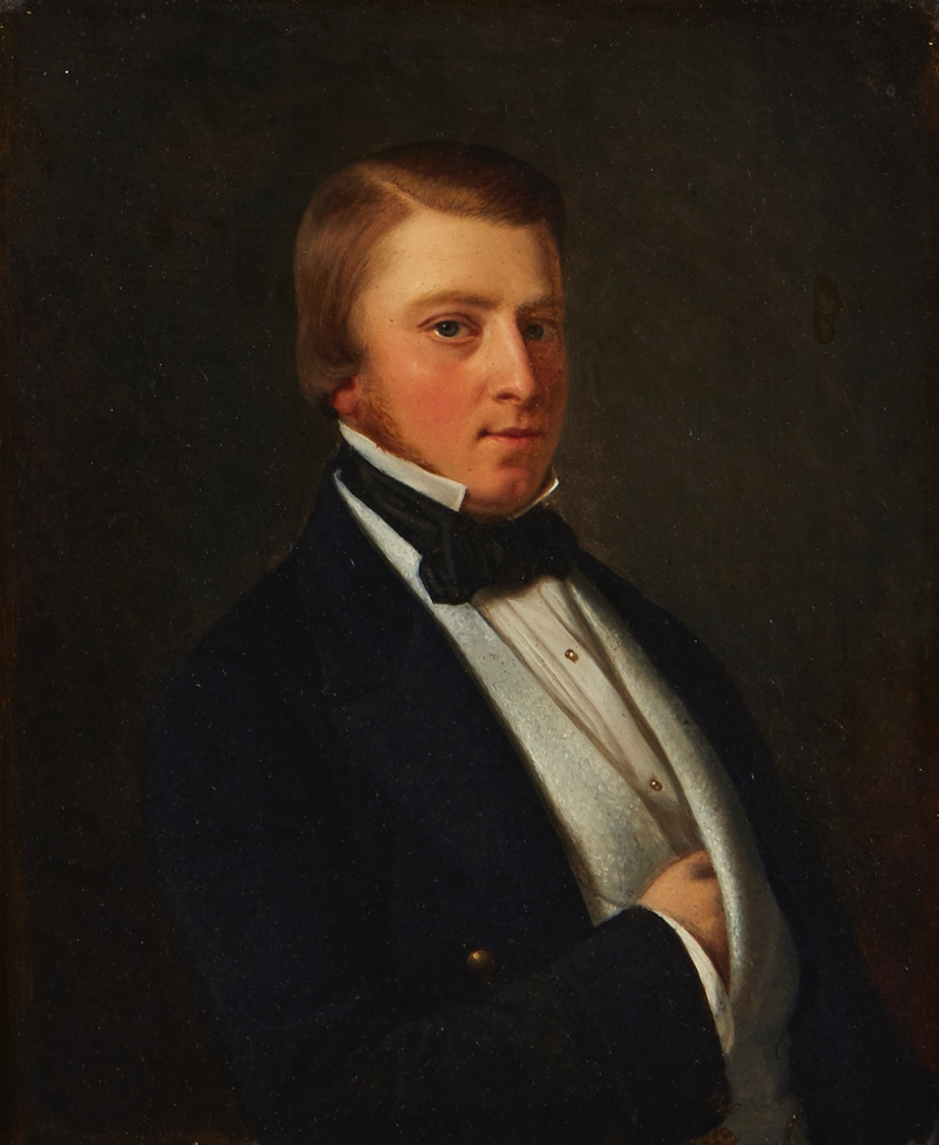 Porträtt av grosshandlaren Carl Leonard Severus Nordström (1826-1897) avporträtterad 1857 i Paris av Per Södermark.